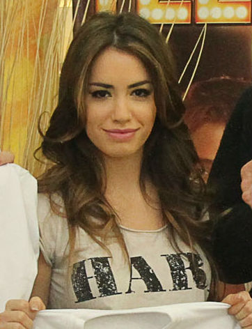 Lali Esposito en los premios EMA's 2012 This is a retouched picture, which means that it has been digitally altered from its original version. Modifications: Cadrage/portrait. The original can be viewed here: Mauricio Macri y los Teen Angels por la "Ciudad Verde".jpg. Modifications made by Bleff. Buenos Aires. Julio 27 de 2012.- El jefe de Gobierno porteño, Mauricio Macri, se reunió hoy con los integrantes de la banda musical TeenAngels, a quienes les comentó las iniciativas que lleva adelante la Comuna en el cuidado del medio ambiente y para promover una Ciudad Verde. “Los jóvenes son quienes llevarán adelante nuestras políticas de protección ambiental para tener la Ciudad Verde que todos queremos”, dijo Macri en el encuentro con los cantantes realizado en el Teatro Gran Rex. El Jefe de Gobierno mencionó que la instalaciones de contenedores para residuos reciclables y las campañas de concientización puestas en marcha van en sintonía con las medias adoptadas para favorecer el uso de bicicletas y colectivos, por las cuales se instalaron ciclovías y carriles exclusivos para el transporte público. Foto: Matías Repetto Bonpland/GCBA